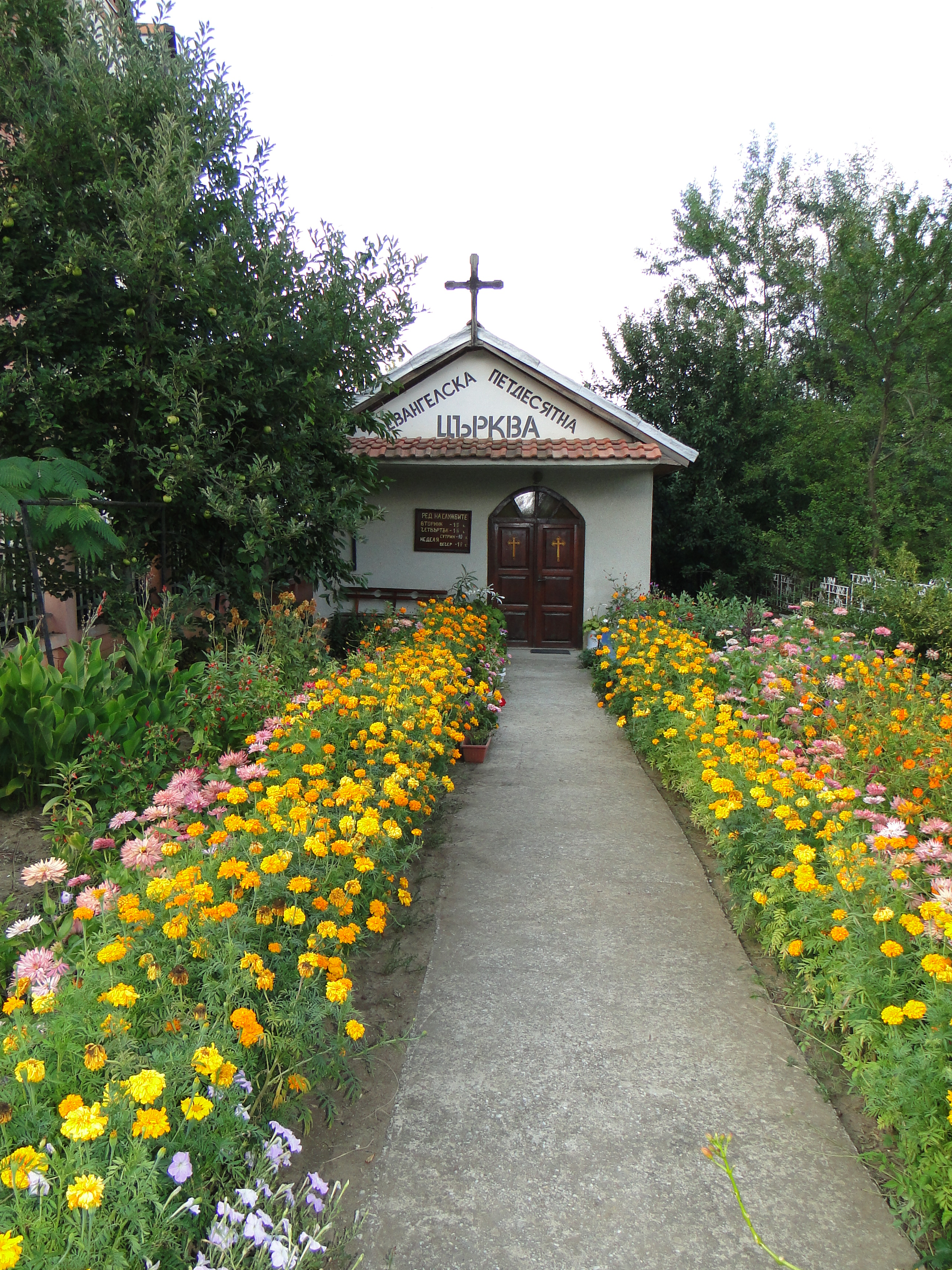 Китен Bulgaria